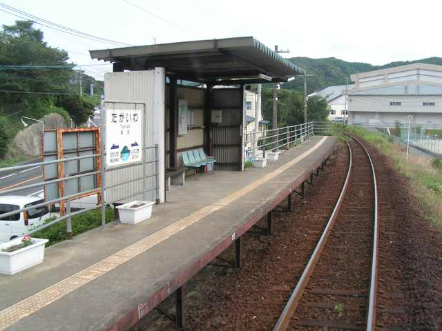 高岩駅 投稿者が撮影(2006/08/28)